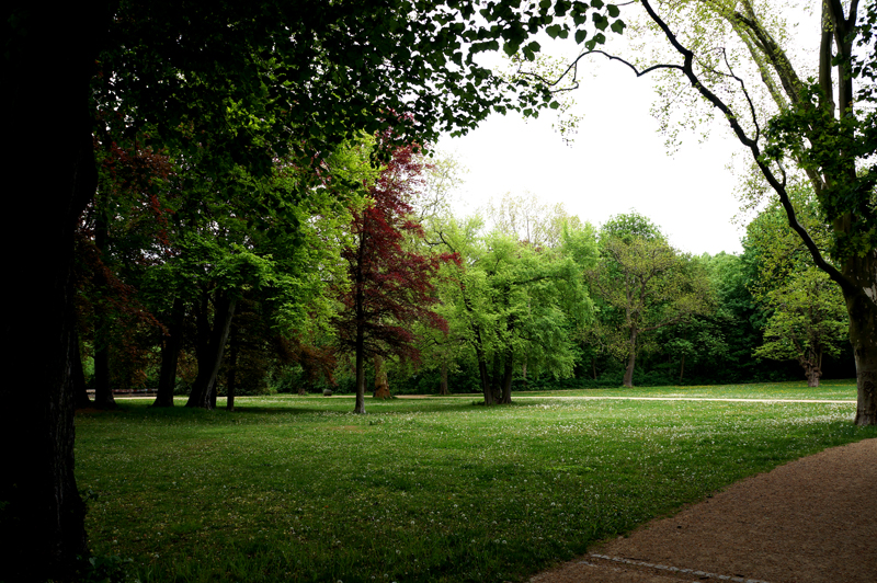 Schlosspark Lichterfelde in Berlin (hier: Parkbereich außerhalb des gleichnamigen Naturschutzgebiets)